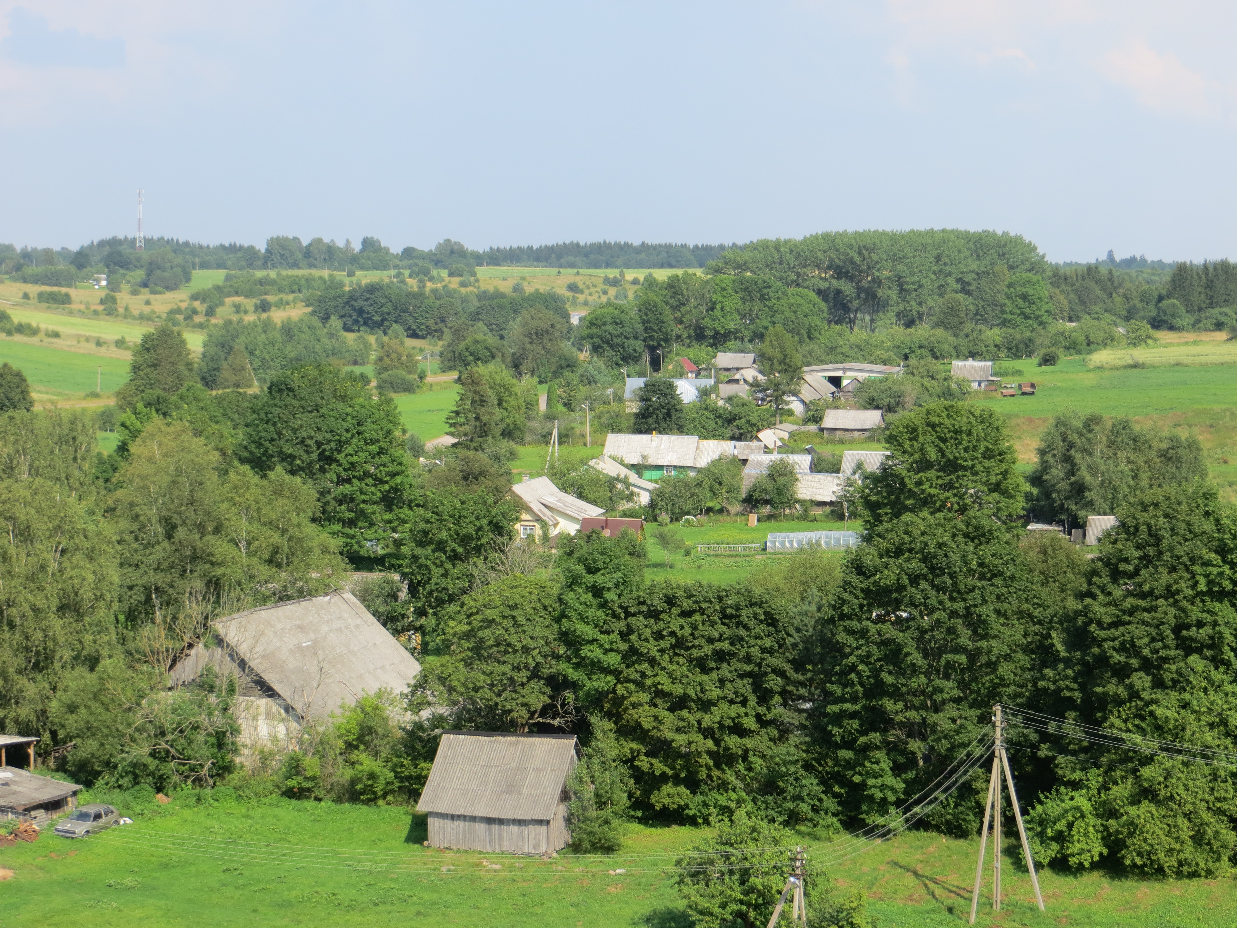 Medininkai, Lithuania